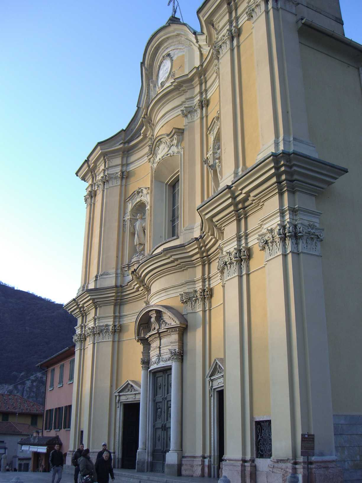 Canzo chiesa di Santo Stefano facciata